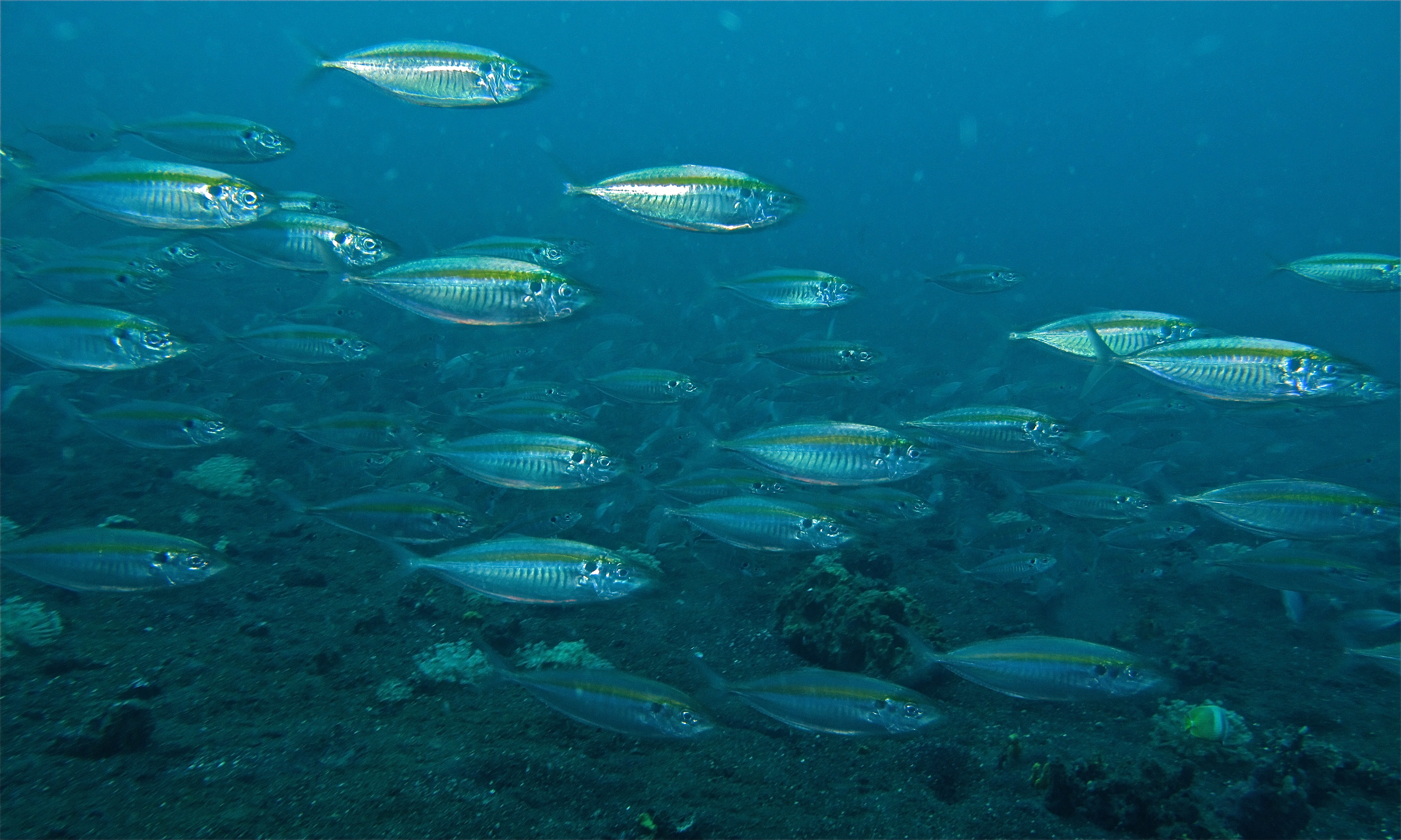 Teluk Temahu III, Lembeh Strait, Sulawesi, INDONESIA